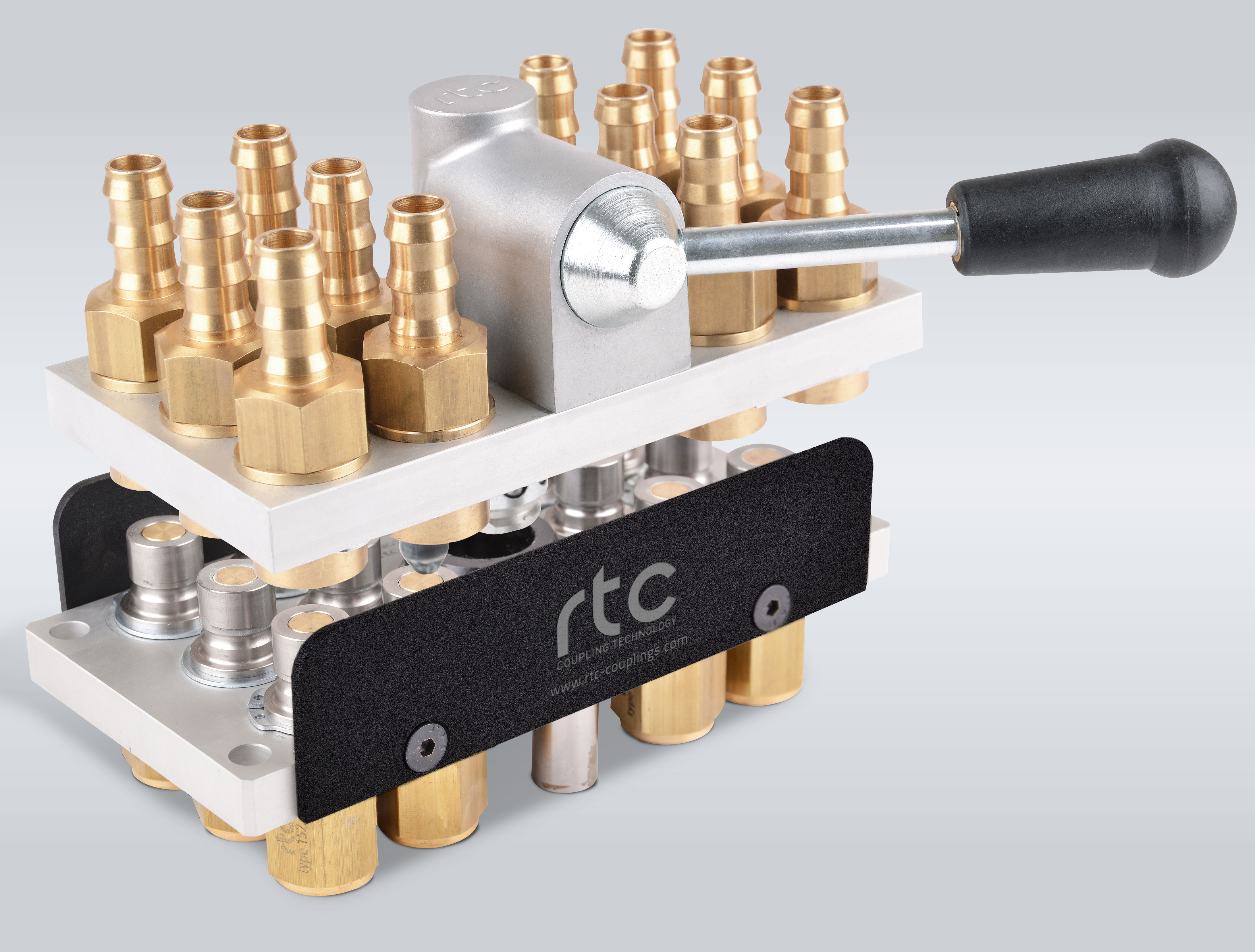 Eine Multikupplung mit Betätigungshilfe (Hebel) von einem der führenden Hersteller für Kupplungssysteme.